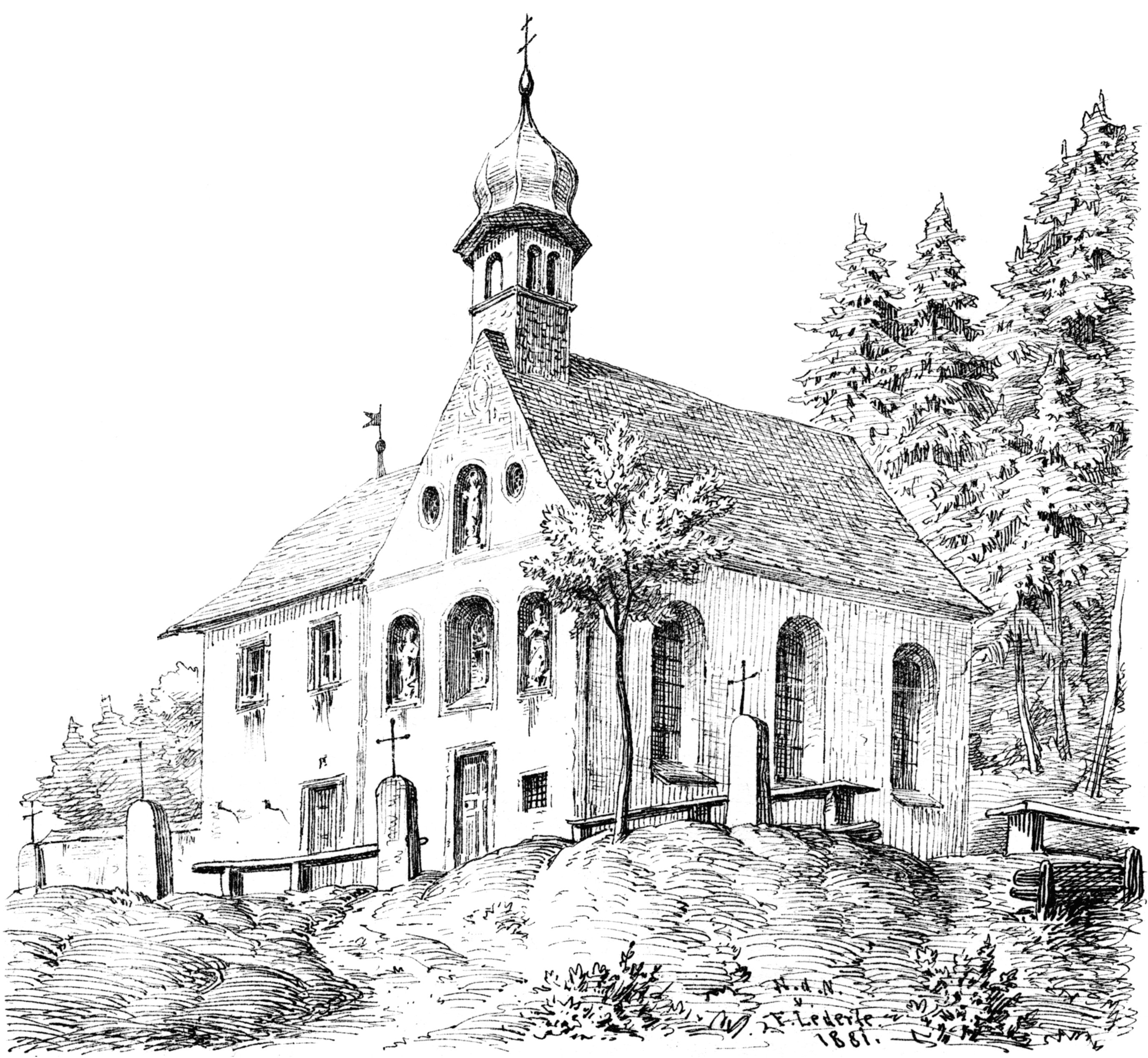 Giersbergkapelle der Pfarrkirche St. Gallus in Kirchzarten 1880,Mitte unten im Stein bezeichnet: N.d.N. (Nach der Natur) v. F. Lederle 1881. Oroginalgröße 16*17,5cm Diese Lithographie entstand exclusiv für die Zeitschrift Schauinsland. Lederles Arbeiten sind beaknnt für ihre Naturtreue geben also ein genaues Bild des Ortes zu der Zeit